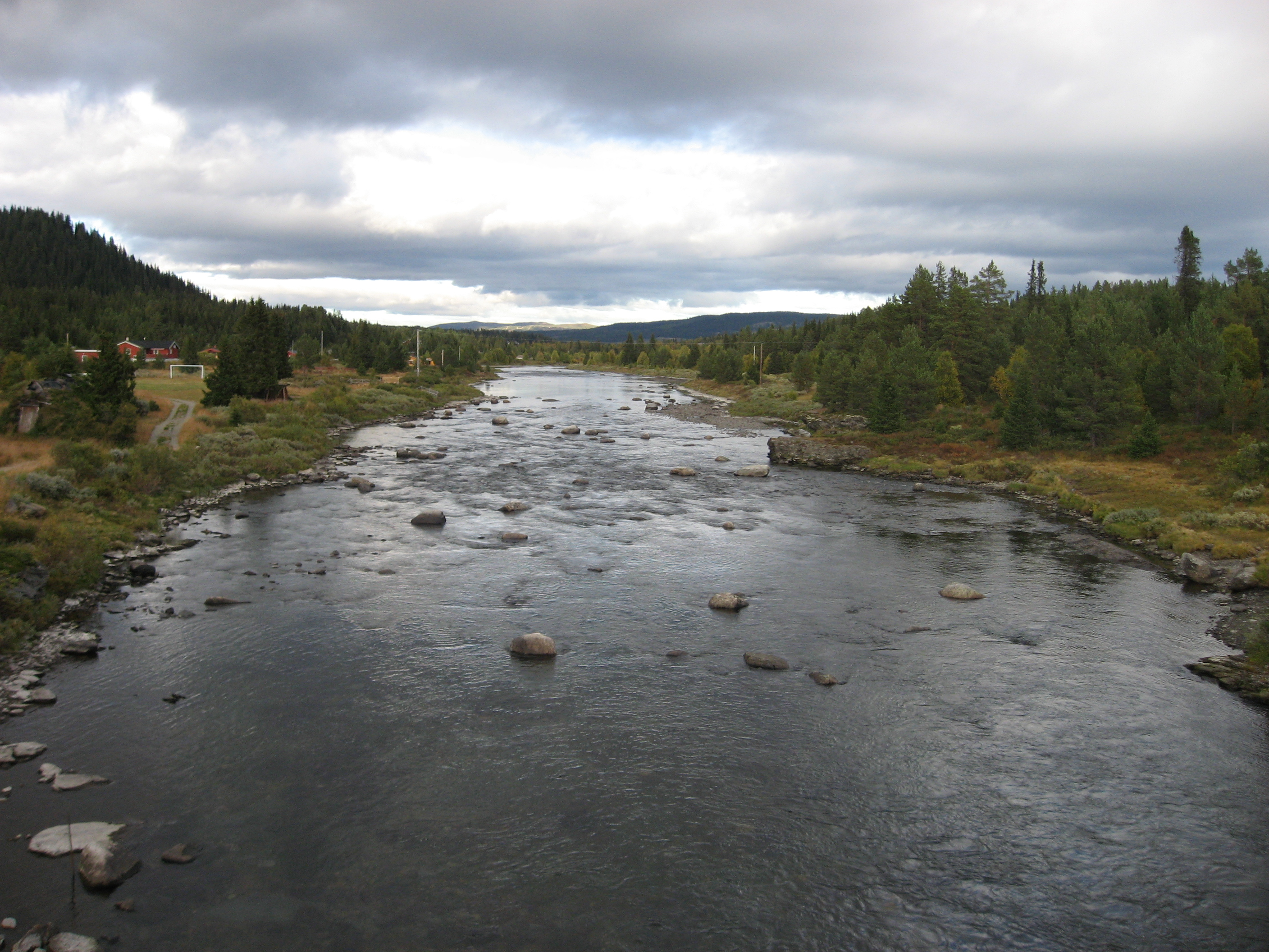 Tisleia fra Ormhamar bru